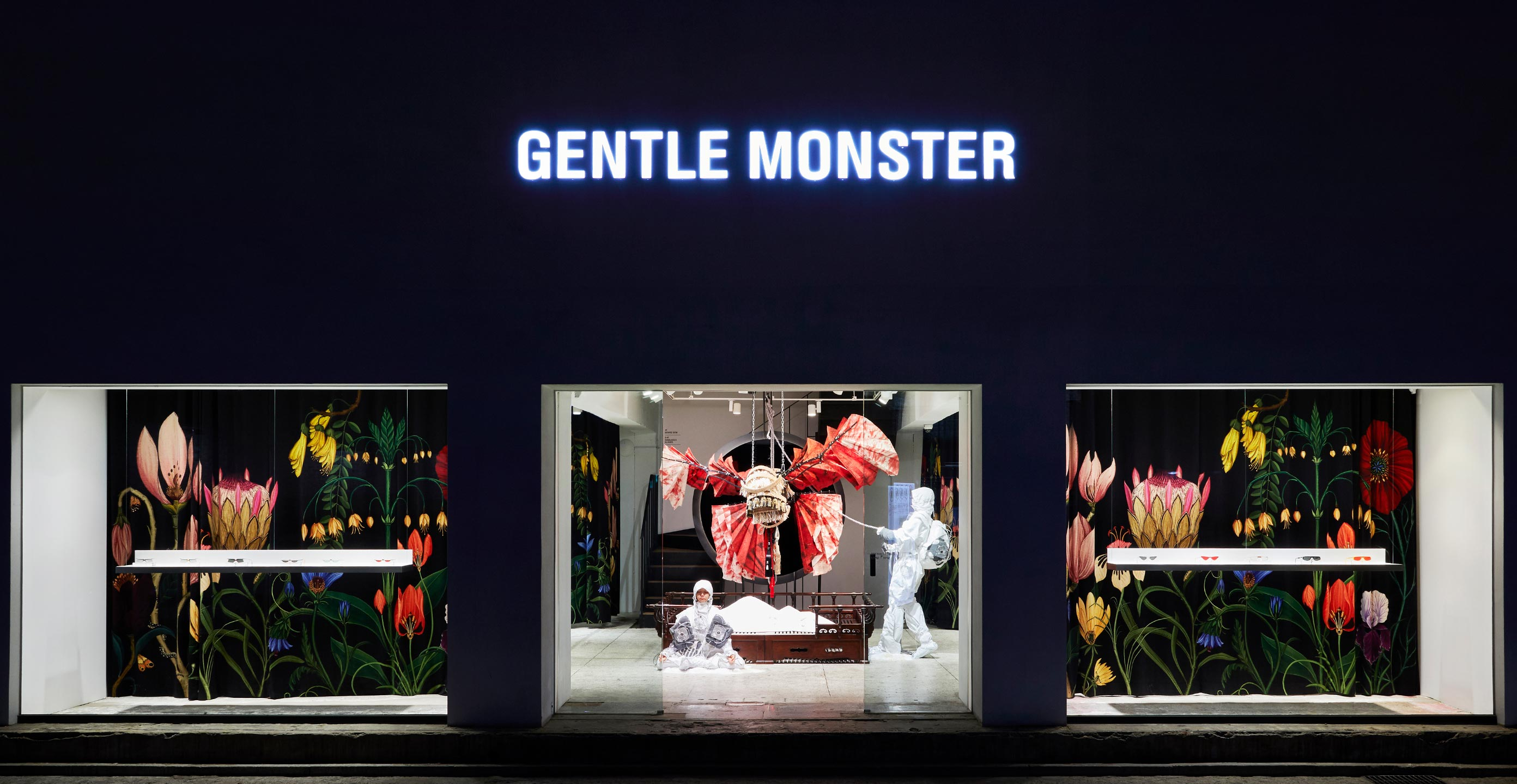 Gentlemonster sinsa store